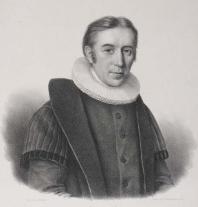 Jacob Jensen Hörup (J J Hørup): Bildnis von Nicolaus Johann Ernst Nielsen Nielsen (1806-1883), Lithographie von Robert Schneider, 1840, Schleswig-Holsteinische Landesbibliothek - Landesgeschichtliche Sammlung